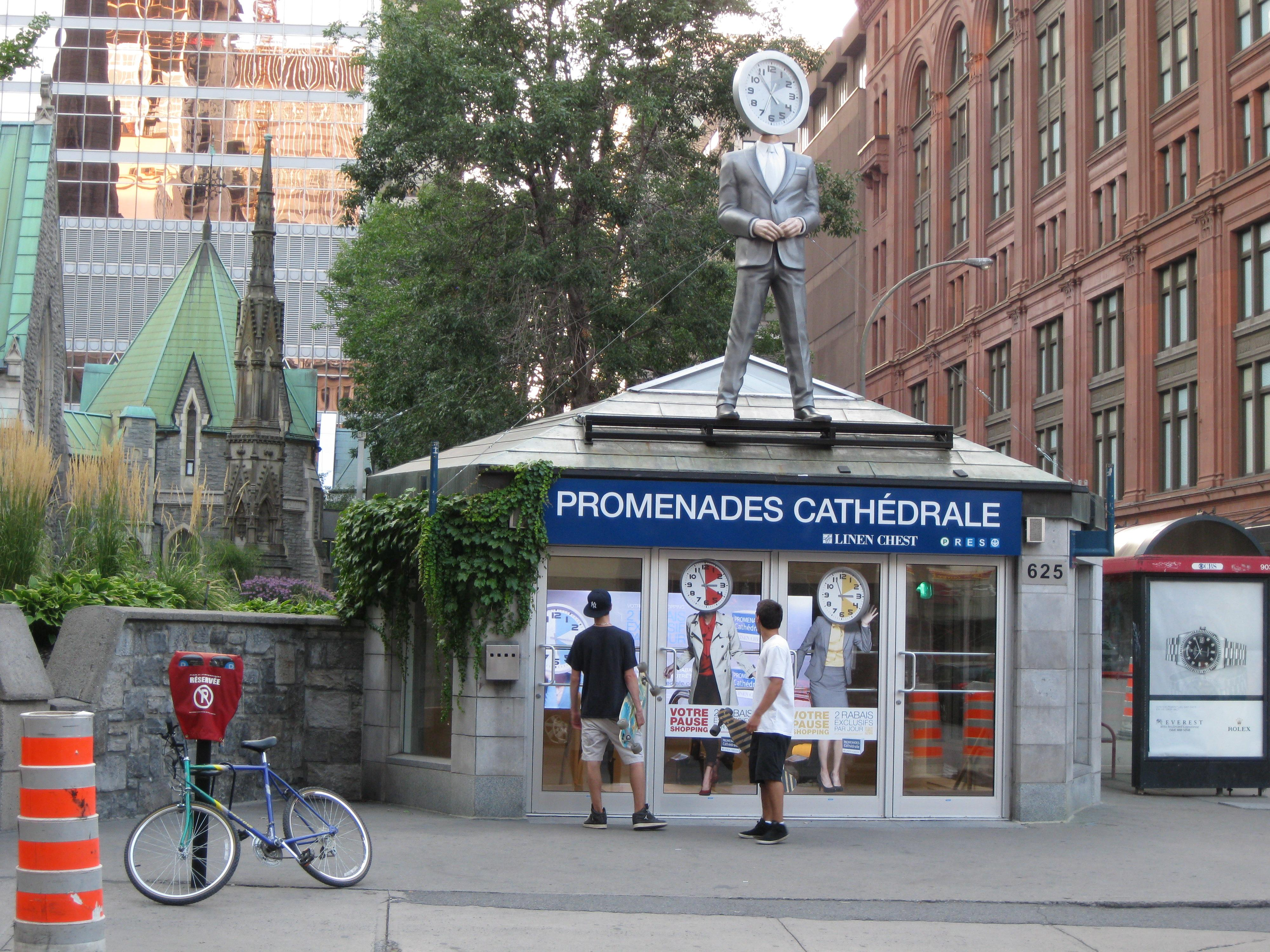 Une des entrées des Promenades Cathédrale à Montréal